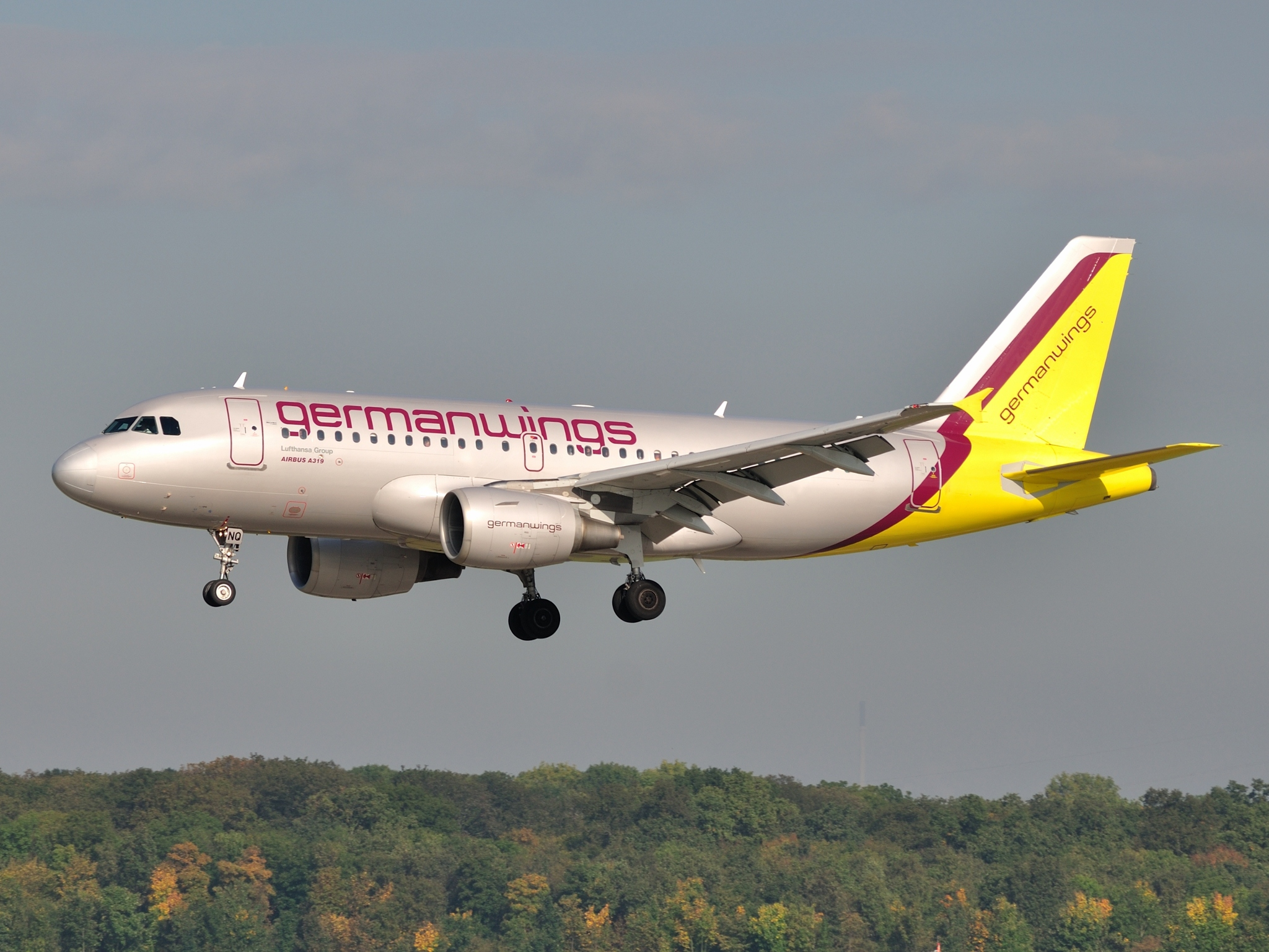 Germanwings Airbus 319 reg. D-AKNQ